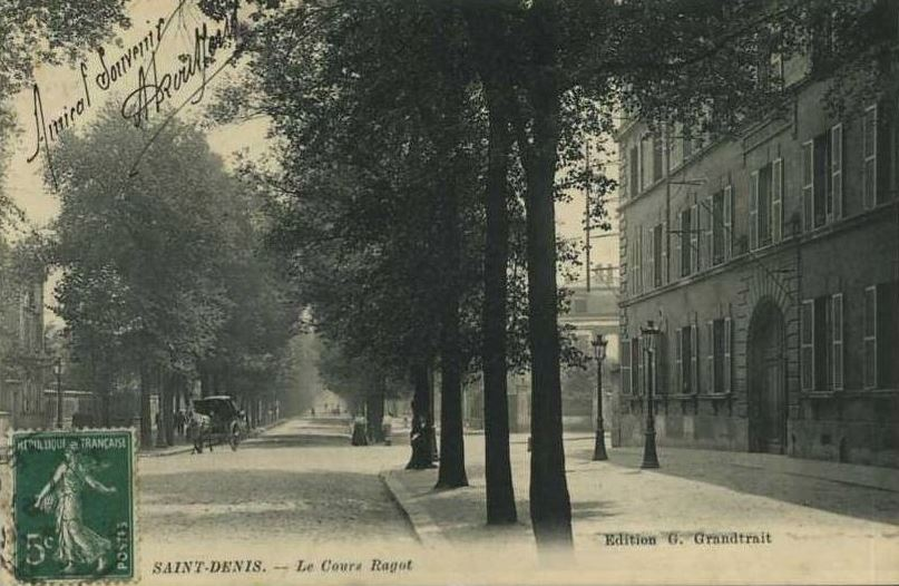 Saint-Denis. Boulevard Marcel-Sembat, anciennement Cours Ragot